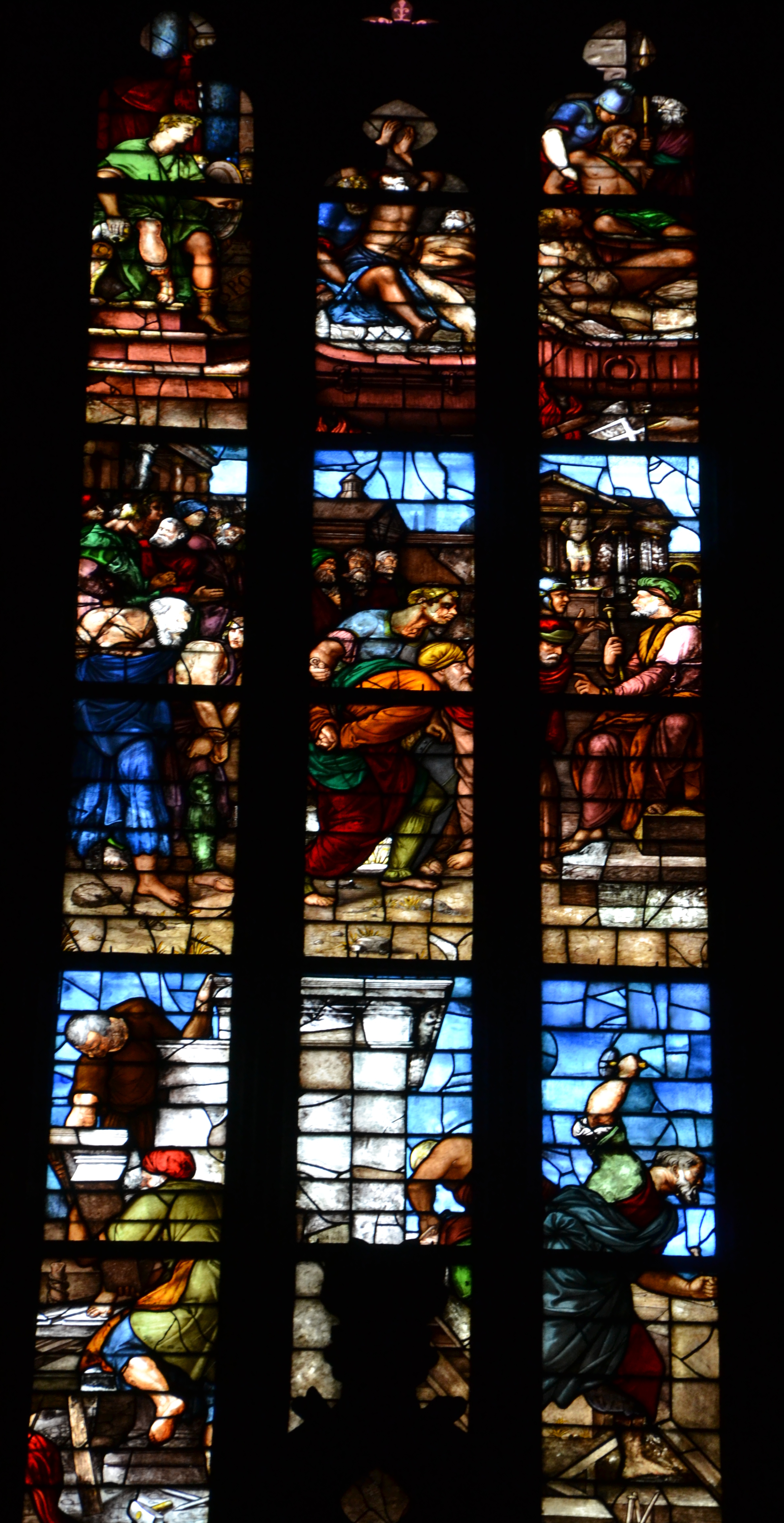 Milano, Duomo, vetrata con le Storie dei Santi Quattro Coronati, opera manierista eseguita su disegno di Pellegrino Tibaldi nel1567 che Corrado de' Mochis traspose su vetro